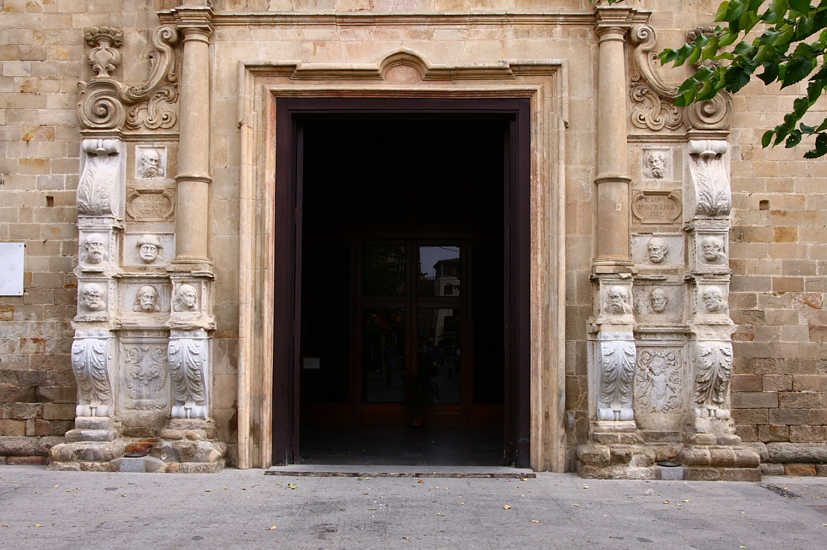 Portada de l'església de Sant Nicolau de Calella de Mar (Maresme-Catalunya). Les escultures dels 12 apòstols és obra de Joaun de Tours (1563).